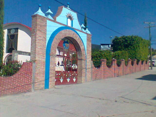 La localidad Mexicana de Zotoltitlan en el Municipio de Mártir de Cuilapan